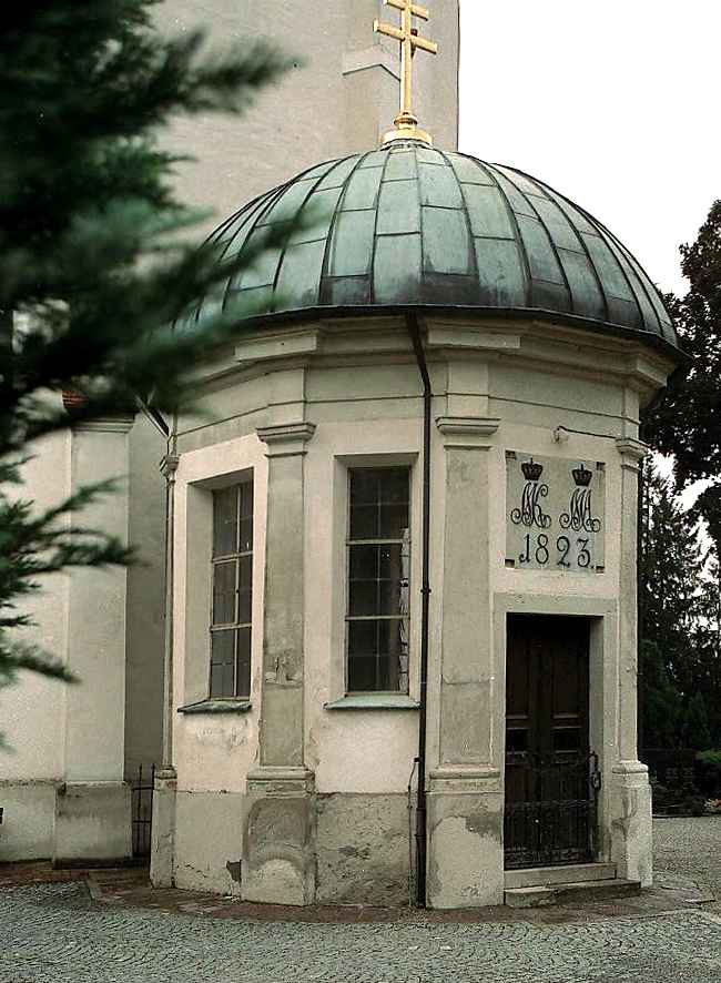 Grabkapelle des Kurfürsten Clemens Wenzeslaus von Sachsen an der Pfarrkirche St. Martin von Marktoberdorf